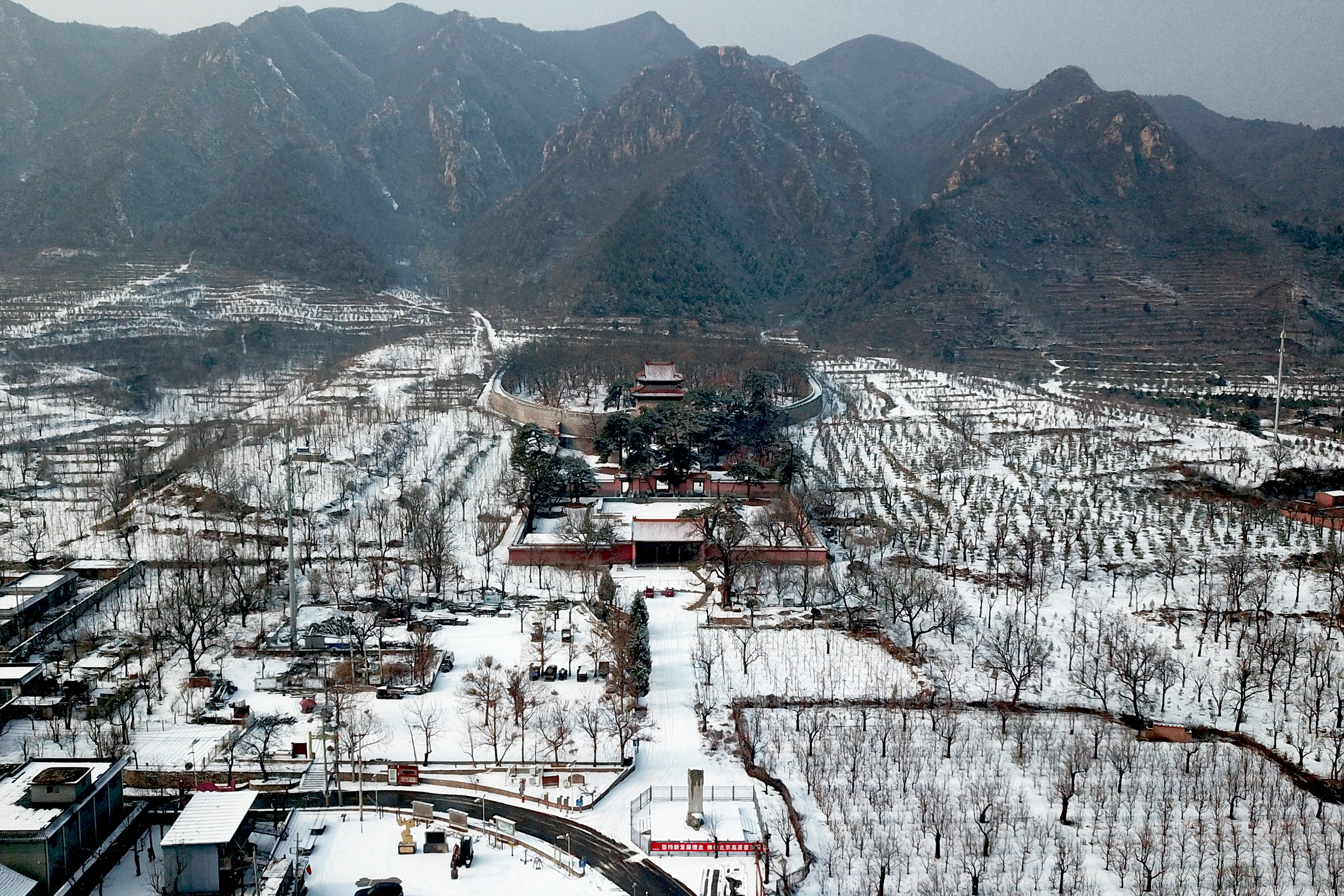 明康陵，明朝第十位皇帝明武宗朱厚照和孝靜毅皇后夏氏的合葬陵寝。